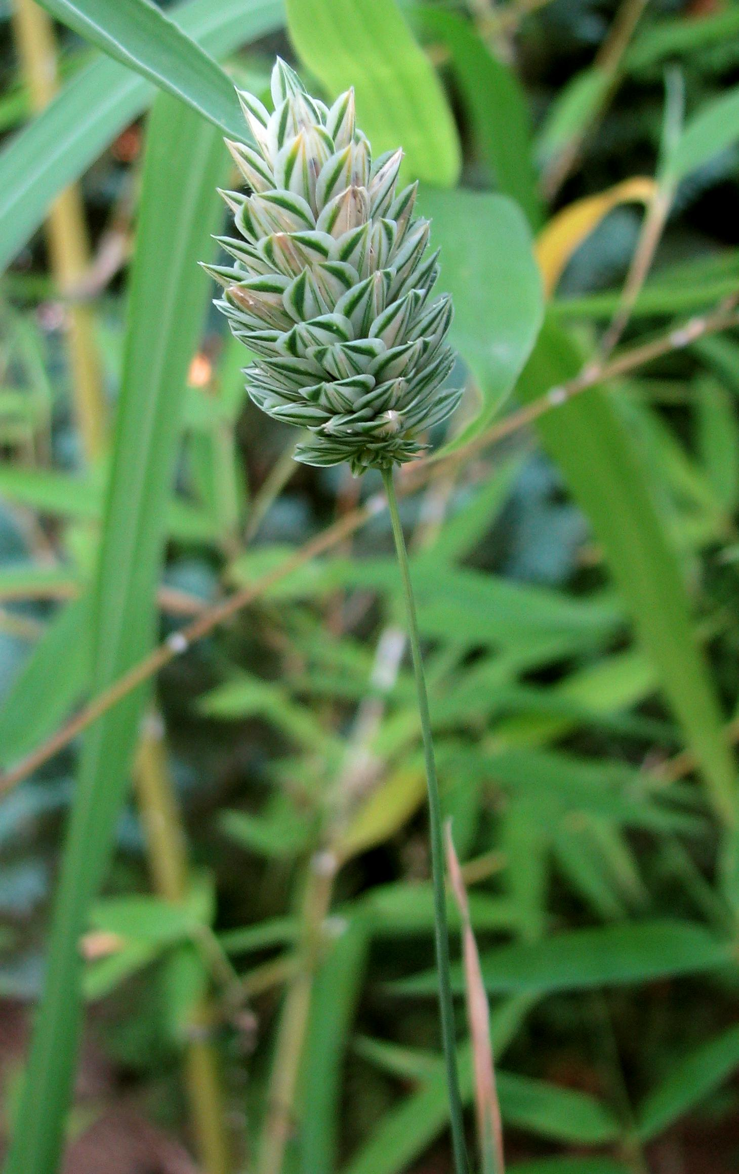 Kanariengras, Spitzsaat, Glanz oder Echtes Glanzgras (Phalaris canariensis) Foto: 29.08.2012